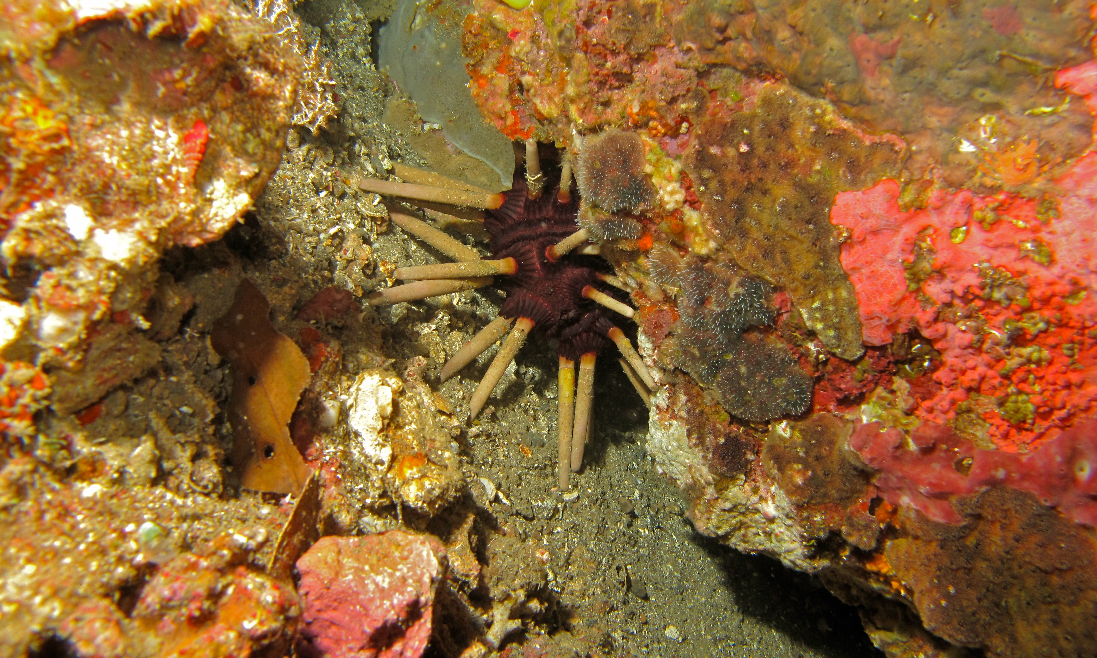 Nudi Falls, Lembeh Strait, Sulawesi, INDONESIA